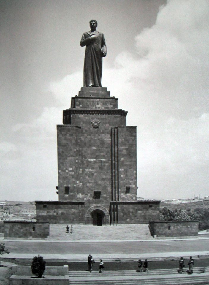 Ստալինի արձանը «Մայր Հայաստան» արձանի տեղում